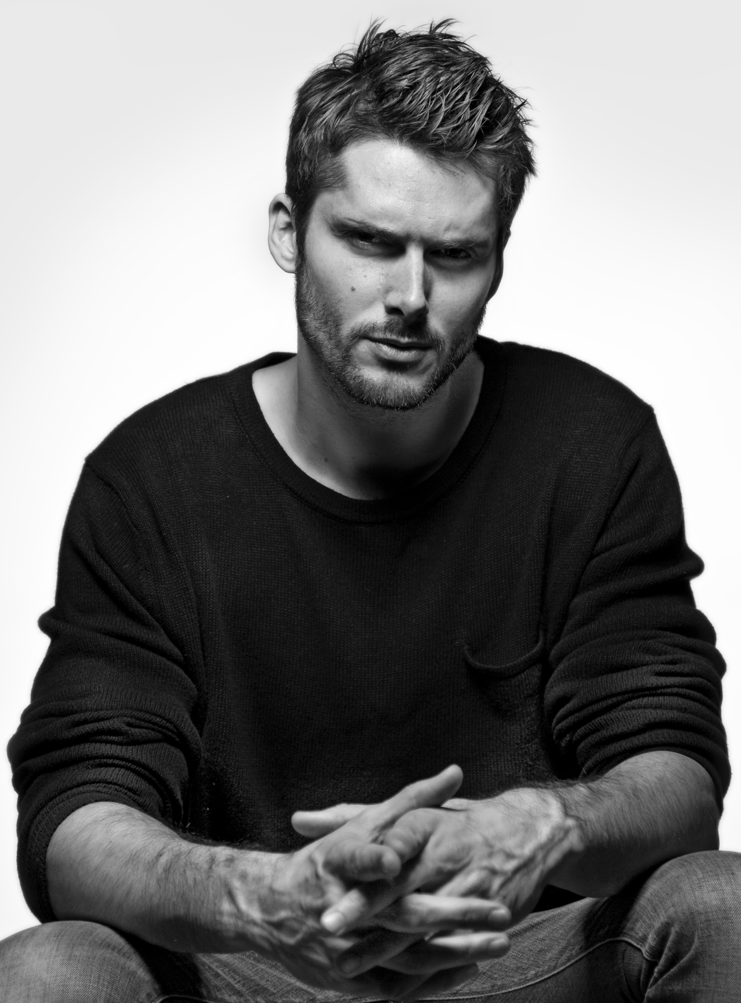 Manuel de los Galanes fotografía